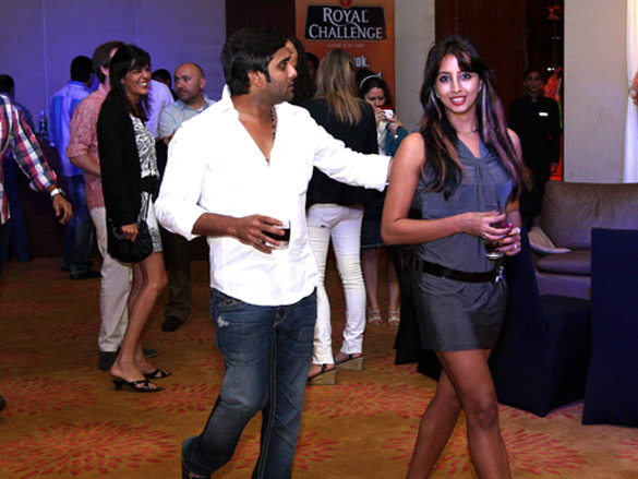 Sanjana at CCL, India.